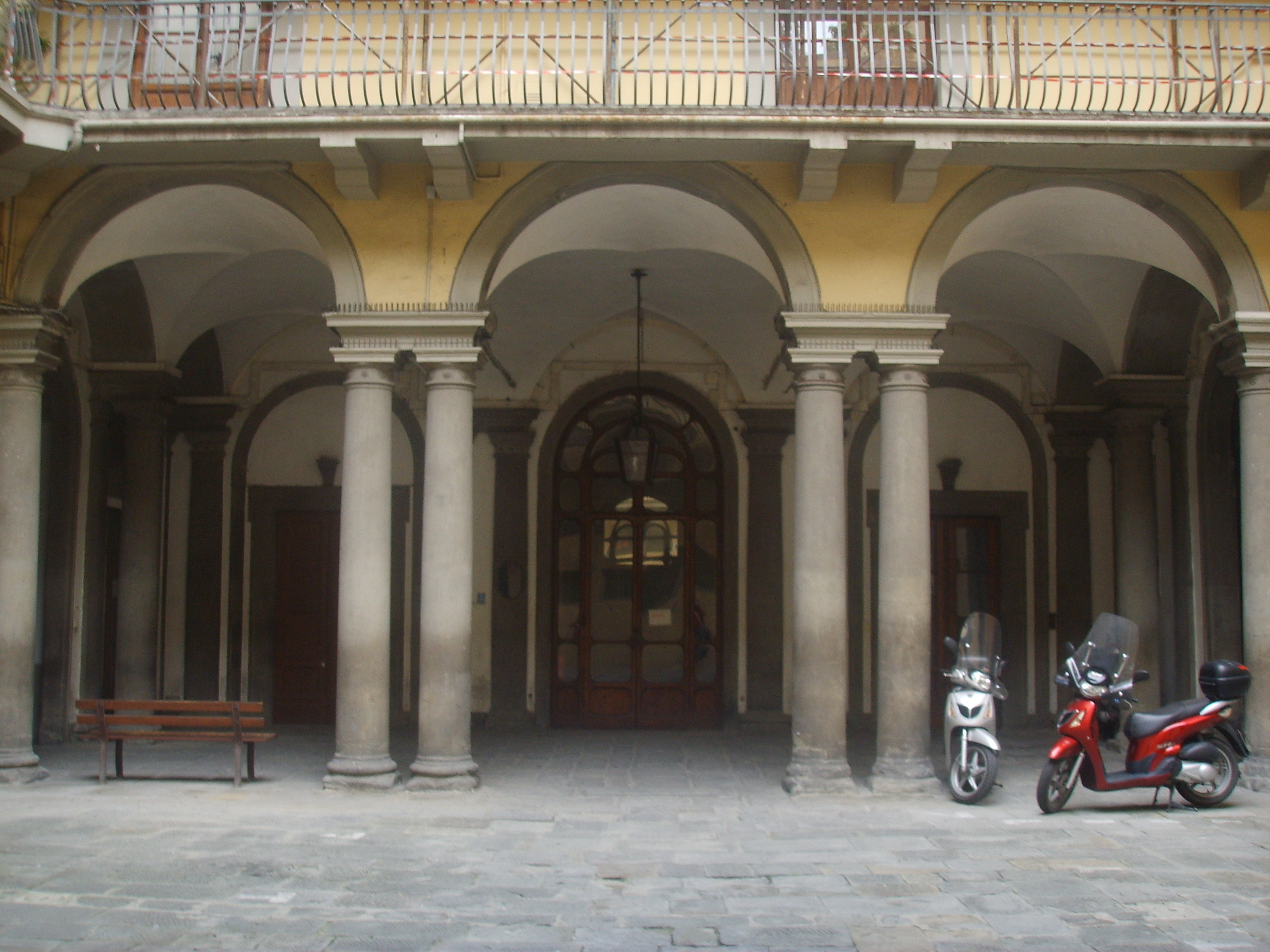 Palazzo Pucci in Florence, Italy